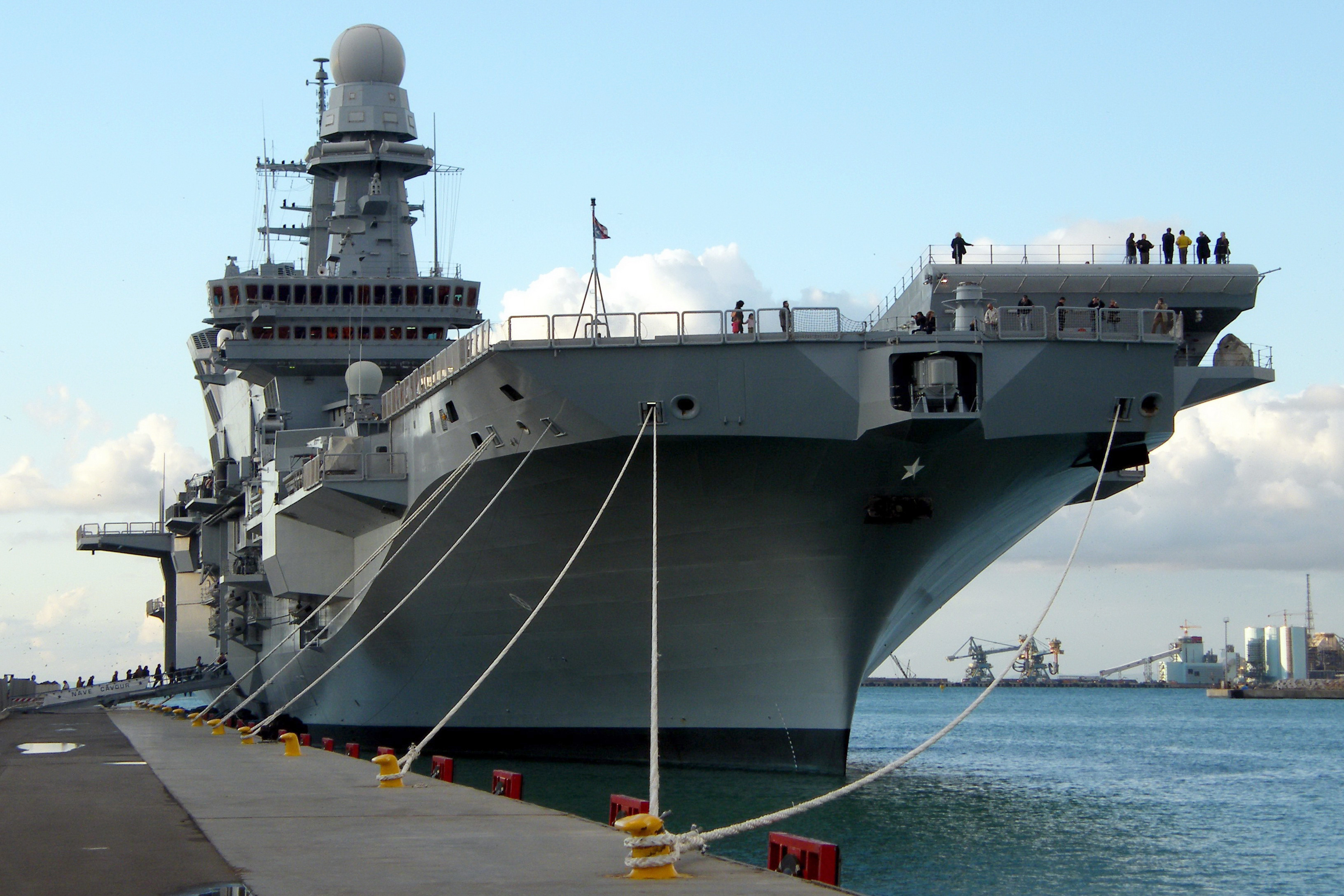 La portaerei Cavour ormeggiata a Civitavecchia